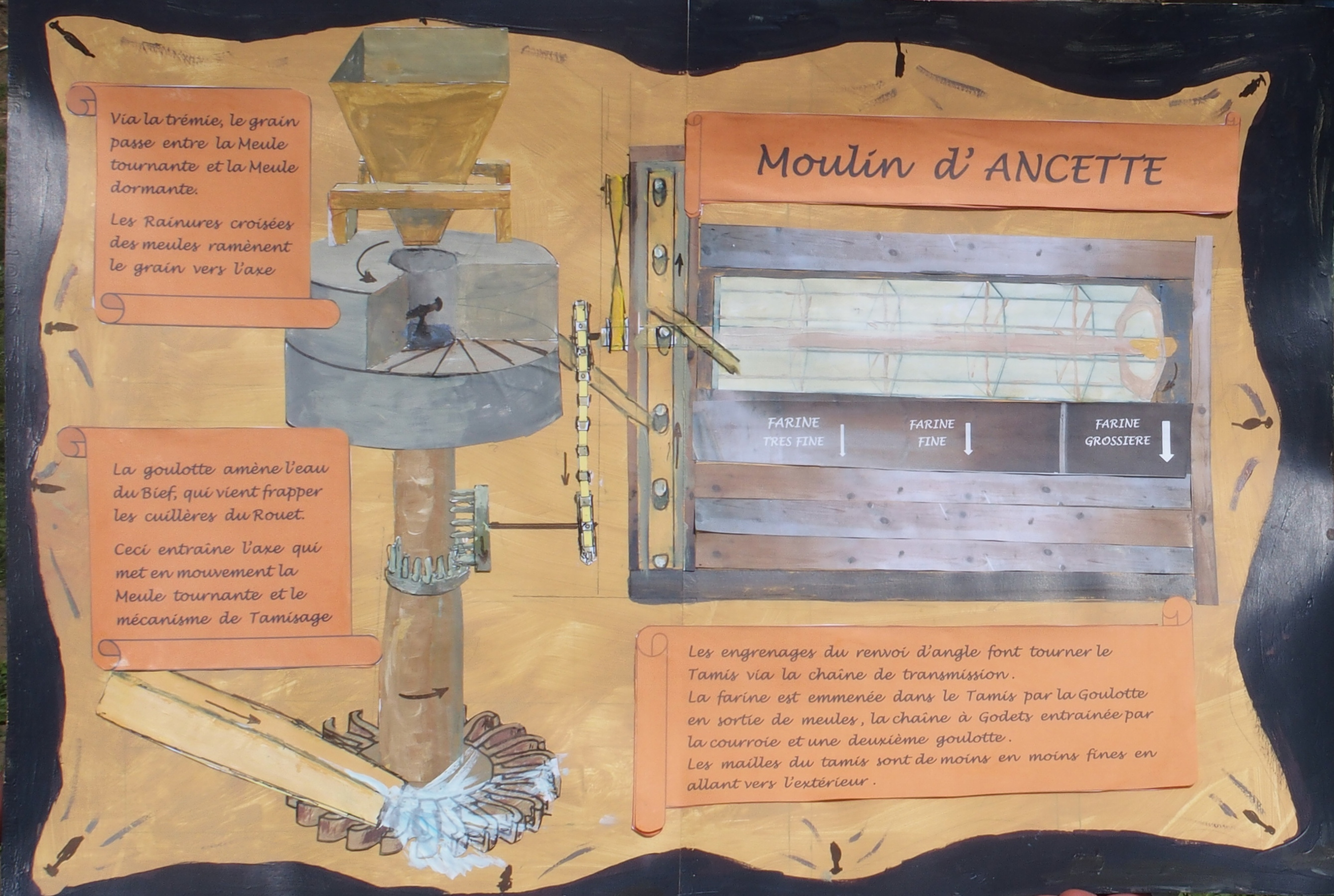 Peinture de Pierre Julien illustrant le Fonctionnement du Moulin d'Ancette